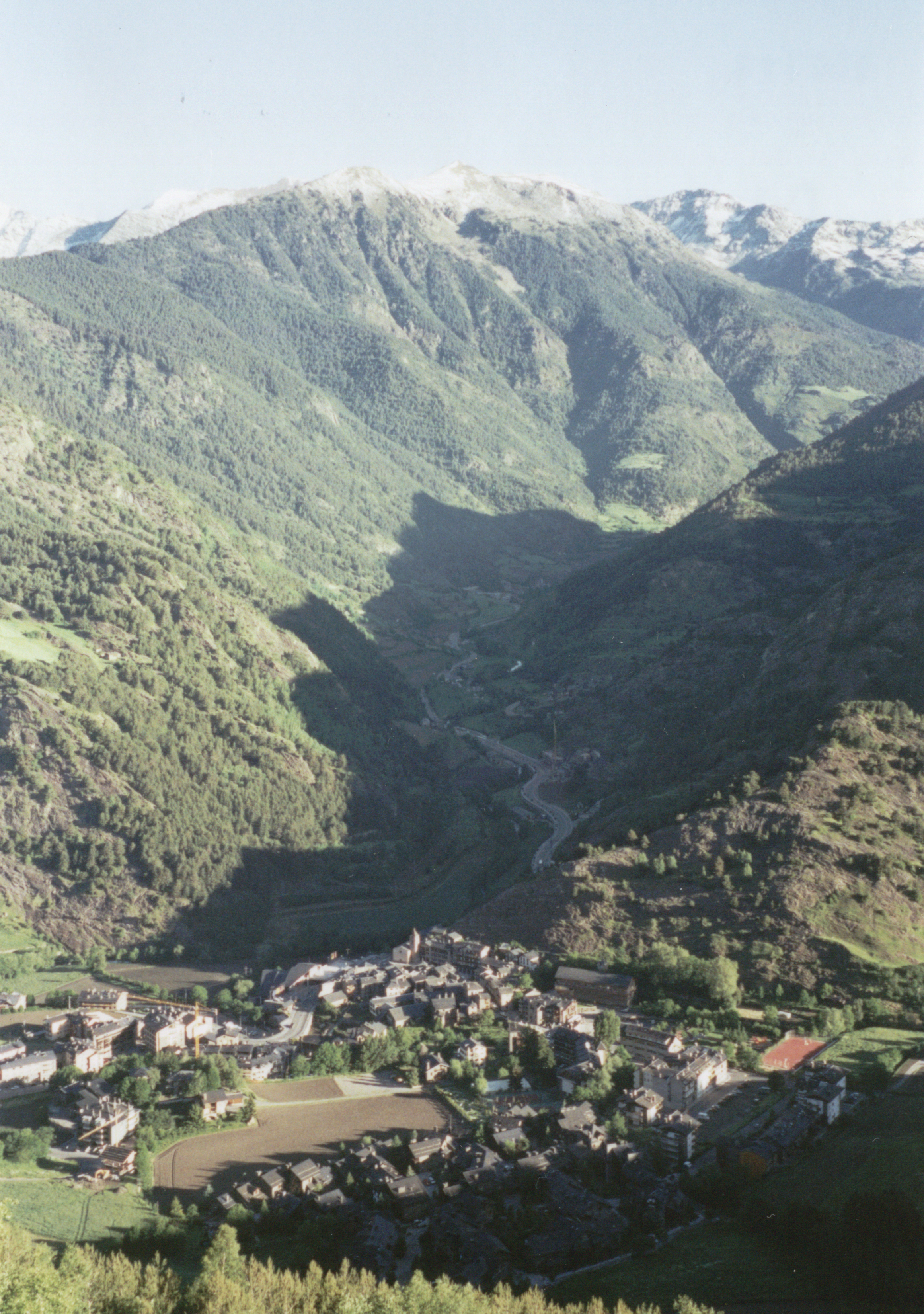 Vista de Ordino, Andorra.